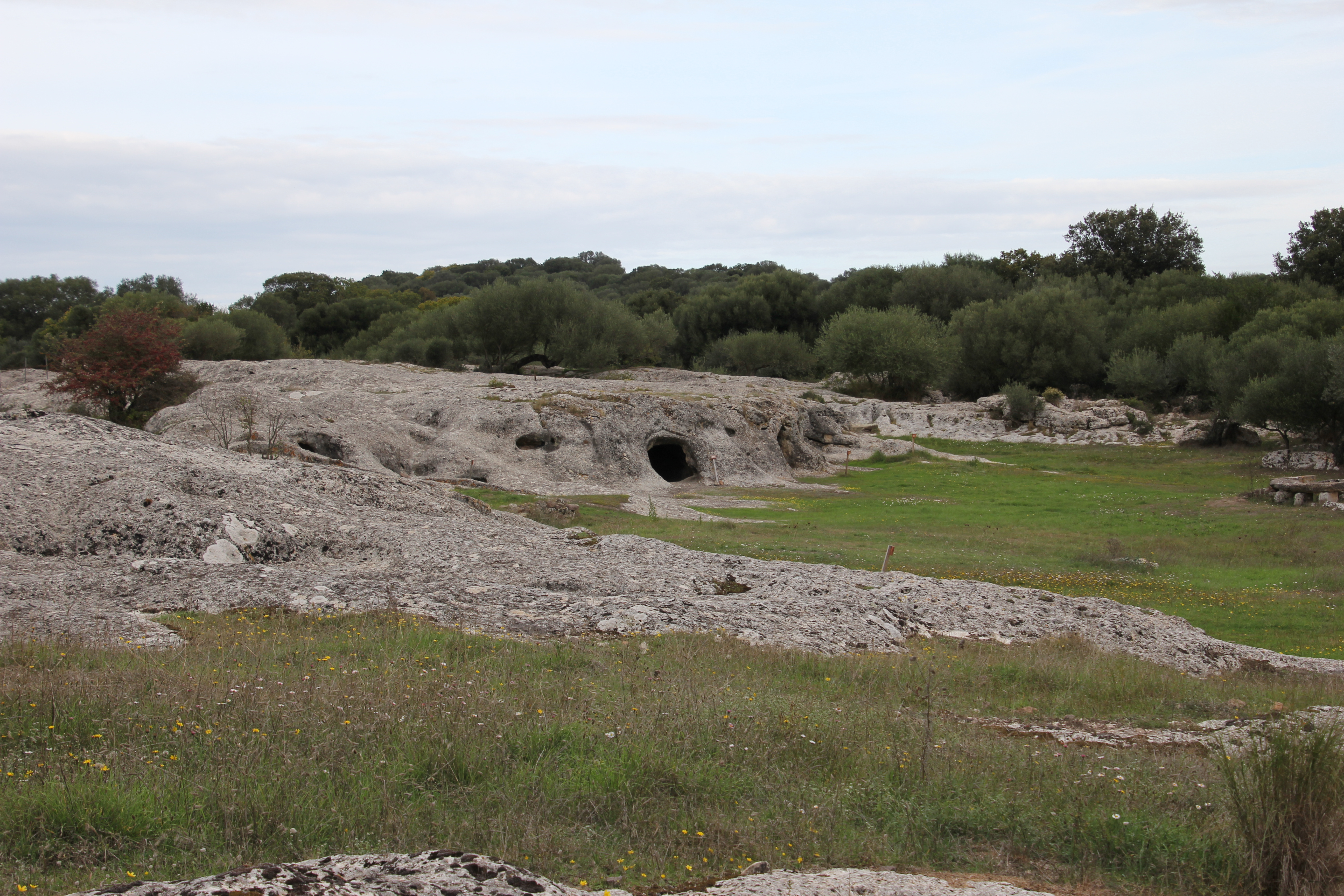 Villanova Monteleone, necropoli di Puttu Codinu